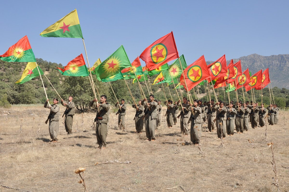 YPG